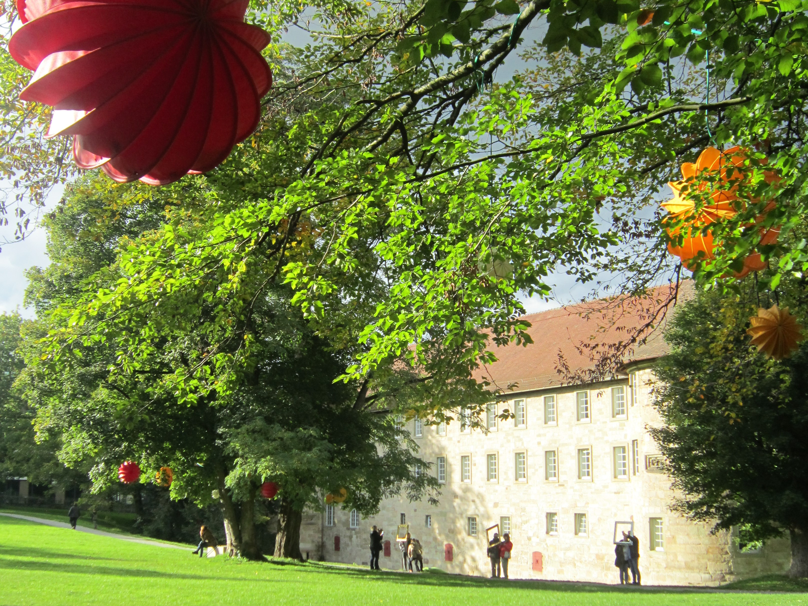 Ausschmückung des Parks des Burgschlosses Schorndorf während des Grünprojekts Remstal 2019 (= Kleine Landesgarenschau in Baden-Württemberg)